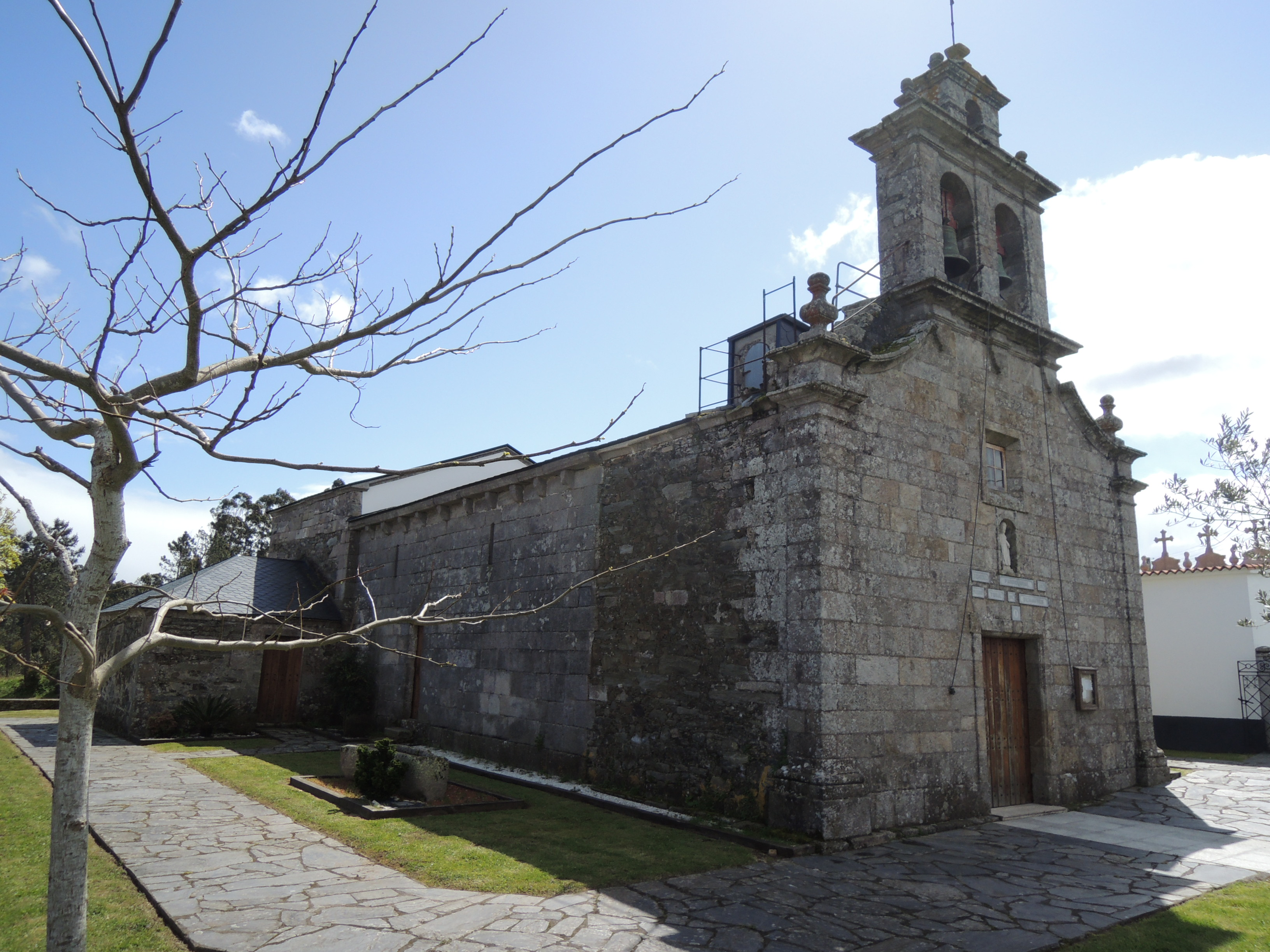 Igrexa de San Tomé de Bemantes, Miño